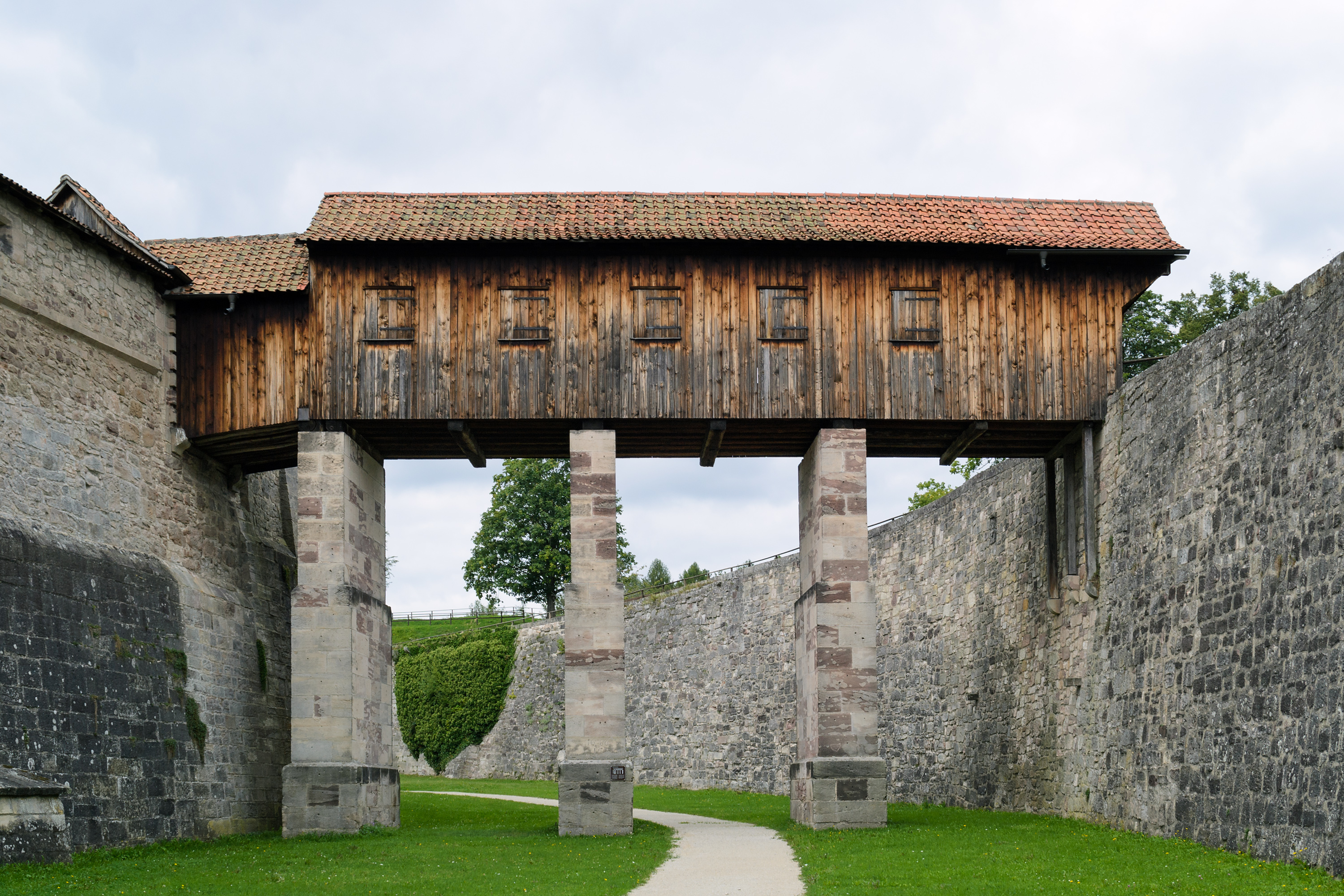 Große Wallbrücke zwischen äußerem und mittlerem Bering der Festung Rosenberg in Kronach.